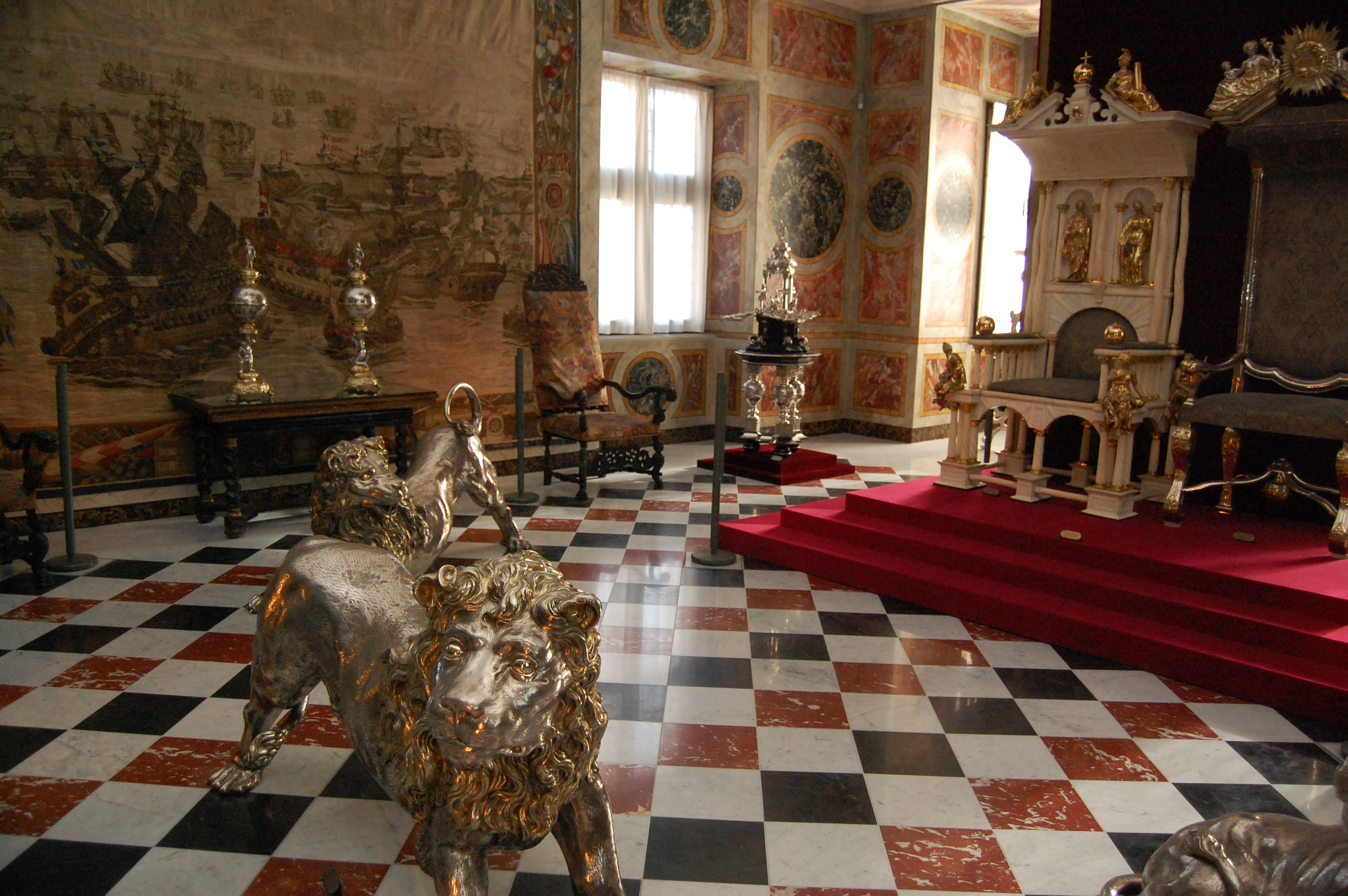 Rosenborg Castle